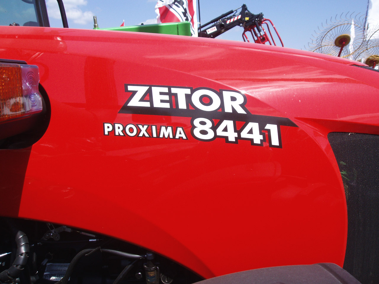 Zetor Proxima 8441 maska